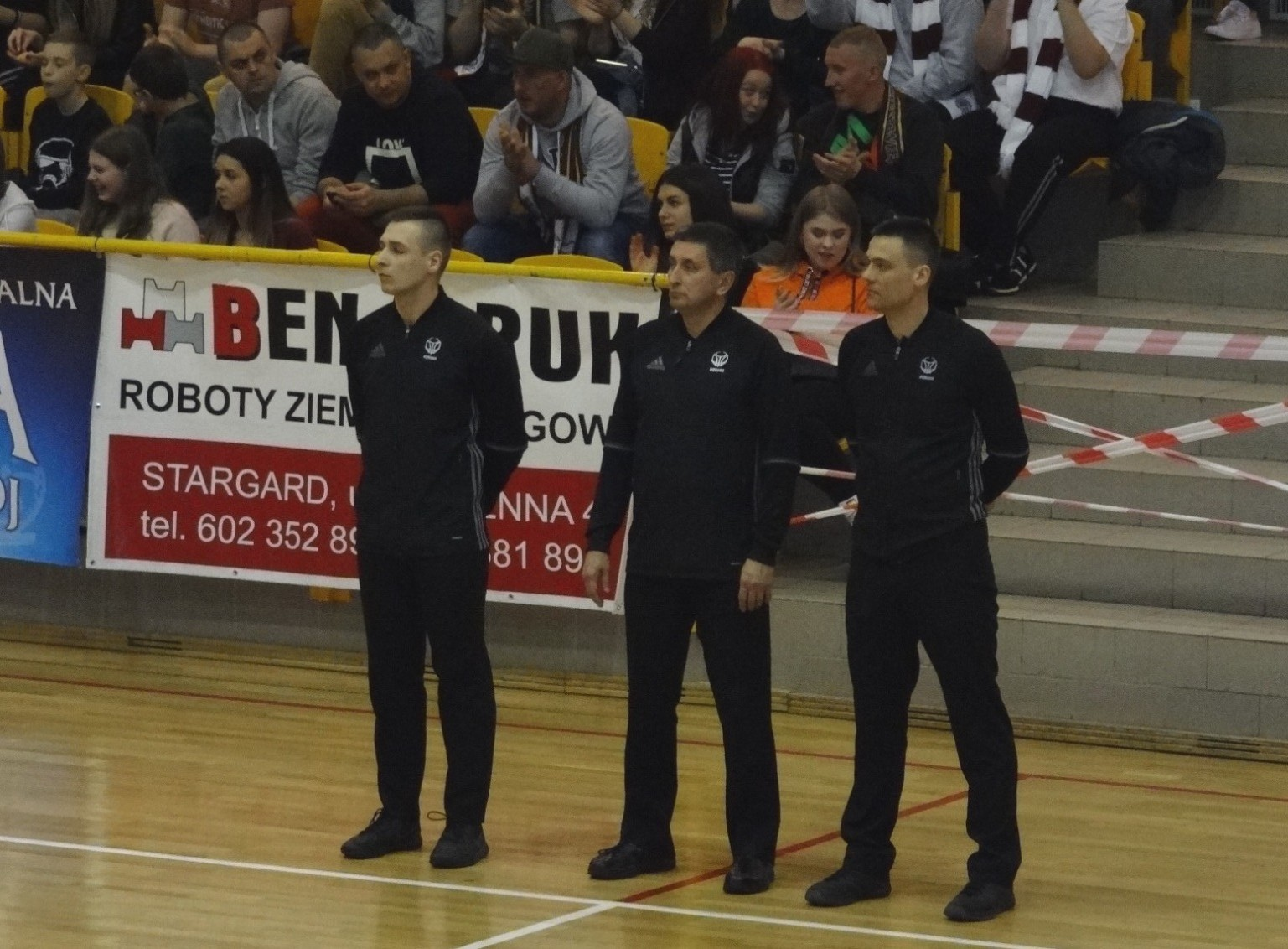 Sędziowie meczu Spójnia Basket, 14.04.2018